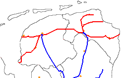 Gebaseerd op nl::Afbeelding:Elektrificatiekaart.png